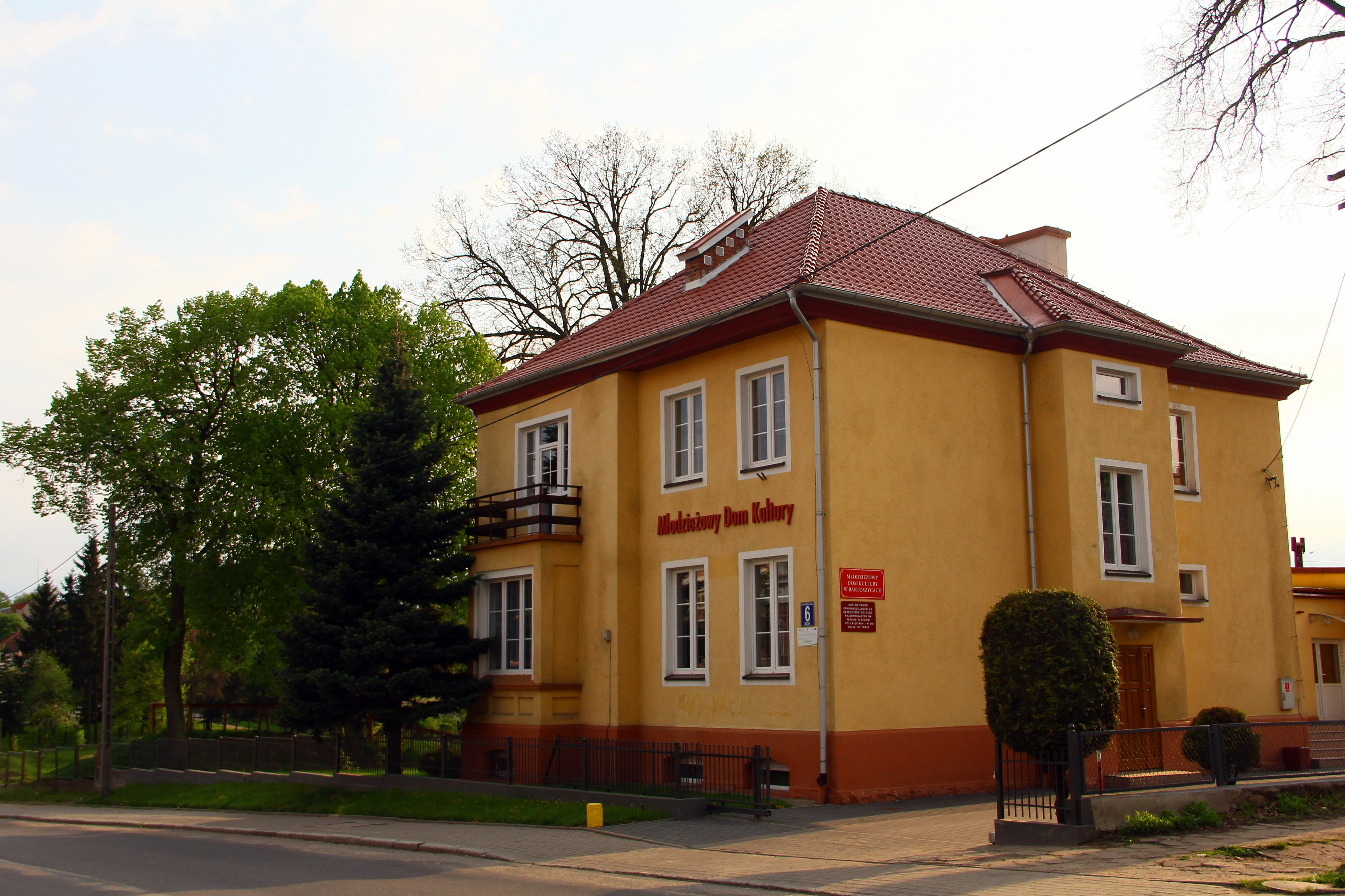 Bartoszyce. Budynek Młodzieżowego Domu Kultury przy ul. Bohaterów Warszawy.